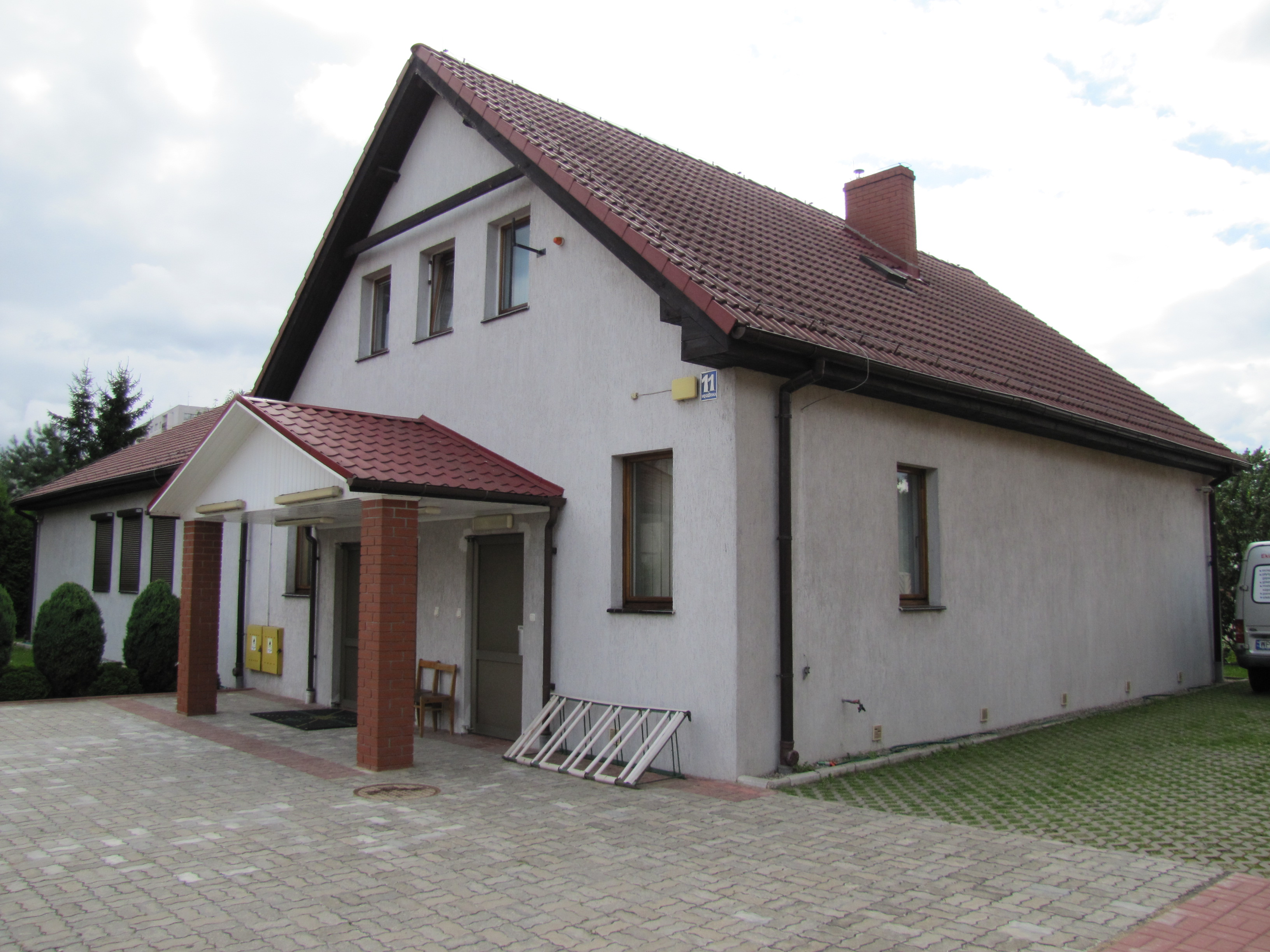 Stargard Szczeciński. SALA KRÓLESTWA ŚWIADKÓW JEHOWY.